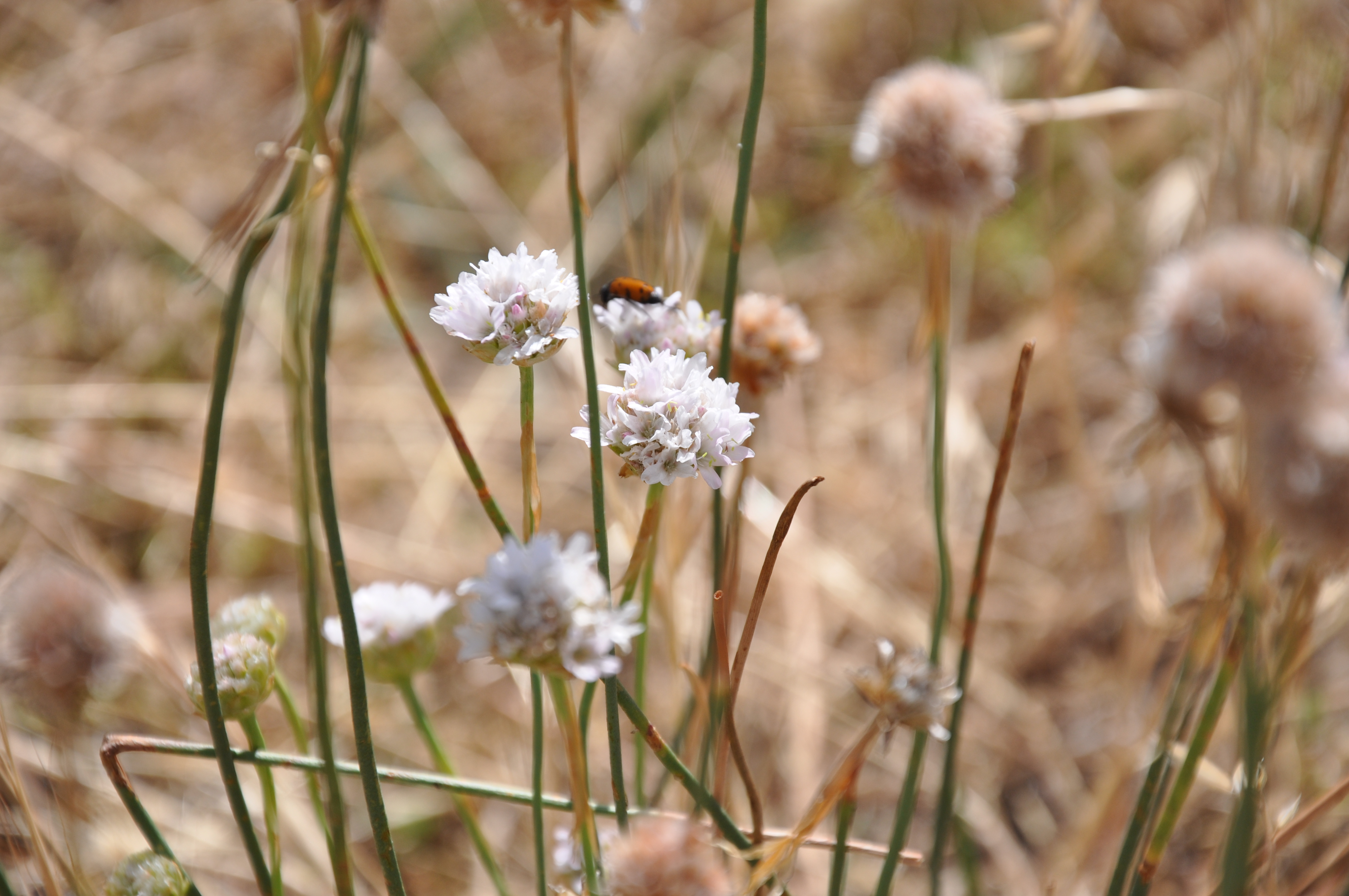 Candelas (Armeria arenaria subps. segoviensis), La Torre-Ávila, España.